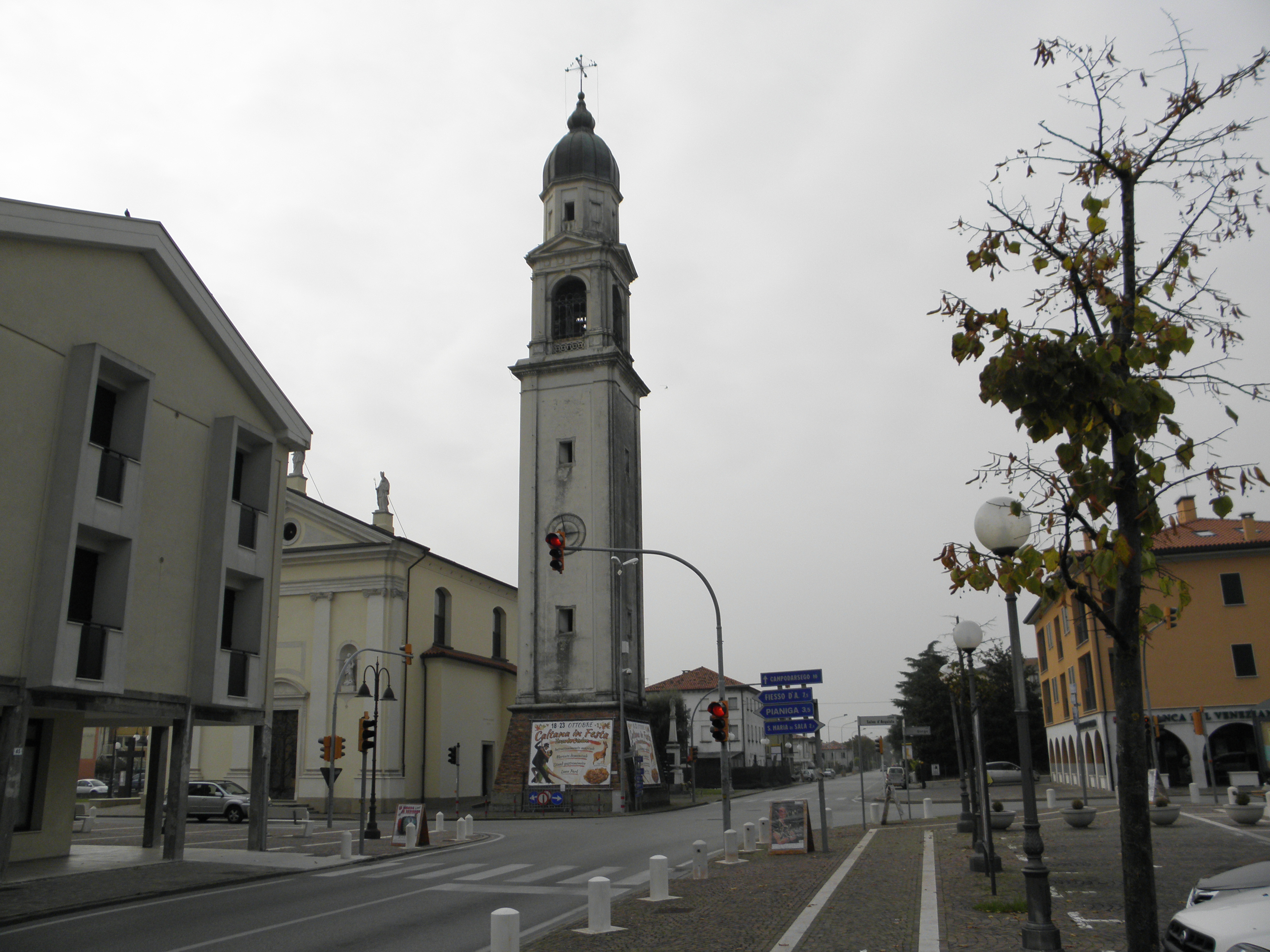 Caltana, frazione di Santa Maria di Sala: scorcio del centro con il campanile della chiesa parrocchiale di San Biagio.